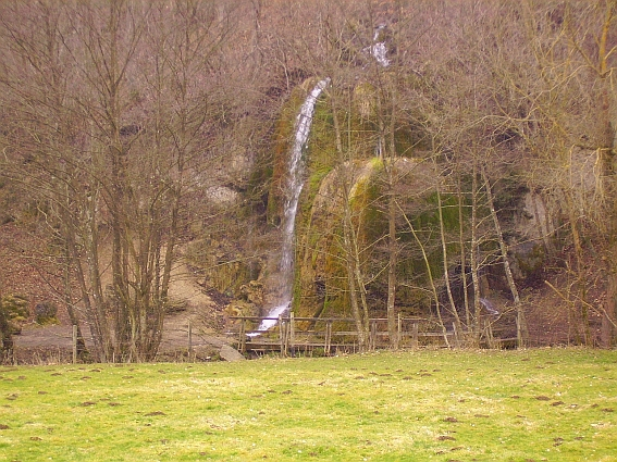 Blick von einem örtlichen Rundweg auf den Wasserfall Dreimühlen.